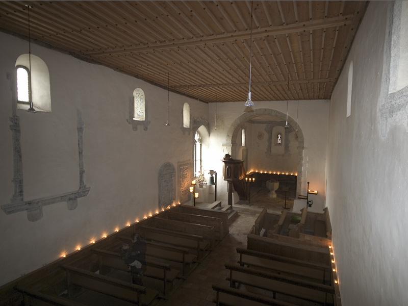 Bergirche St. Michael in Büsingen am Hochrhein, Innenansicht